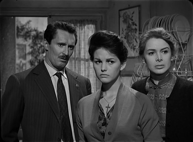 Pietro Germi, Claudia Cardinale ed Eleonora Rossi Drago in una scena del film Un maledetto imbroglio (1959).